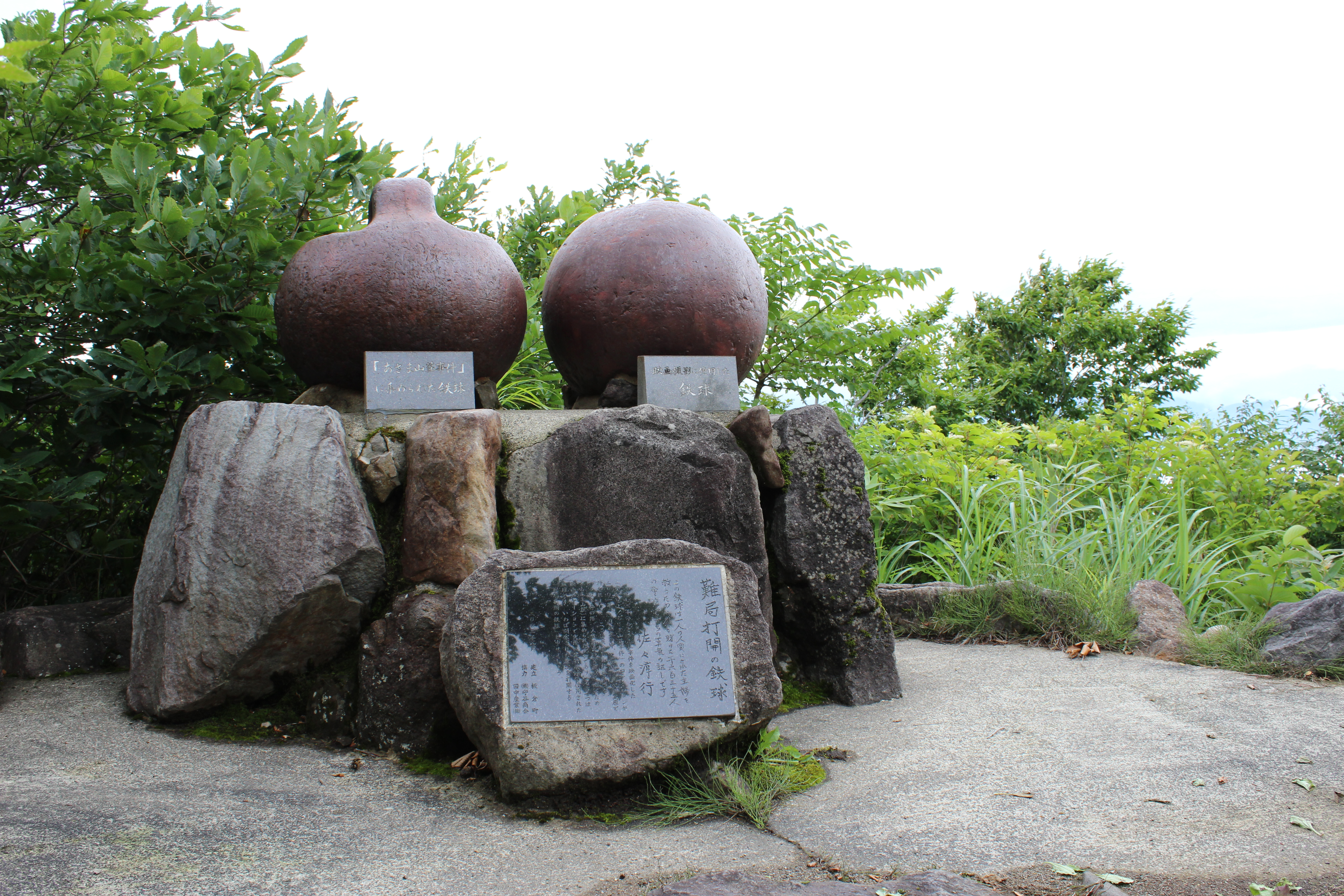 浅間山荘事件で集められた鉄球のうちの一つ（左）と映画「突入せよ! あさま山荘事件」の撮影で使用された鉄球。光ヶ原高原（新潟県上越市板倉区）。